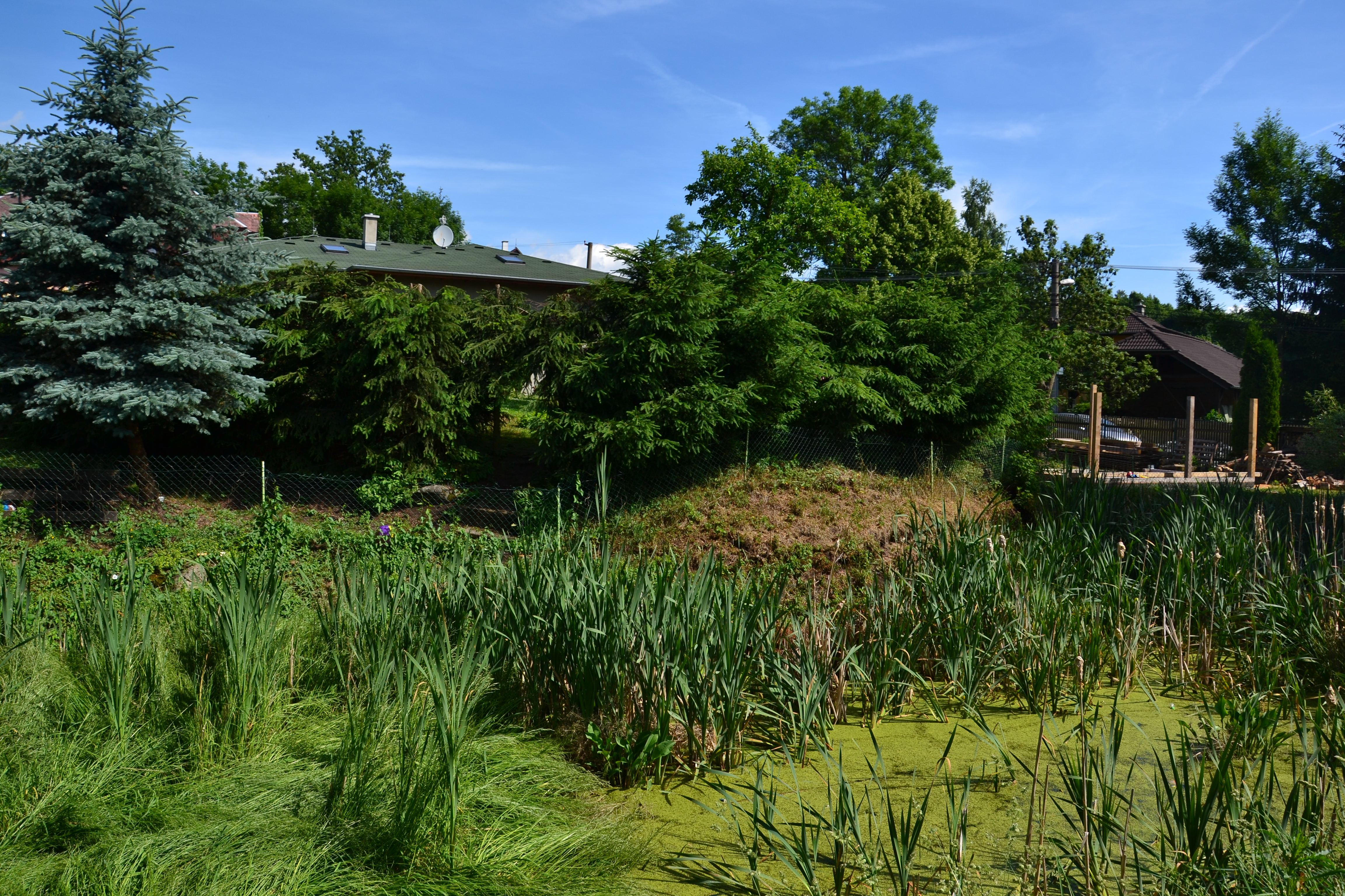 Tvrziště, ve středu obce za budovou obecního úřadu čp. 68, Hájek (okres Karlovy Vary).